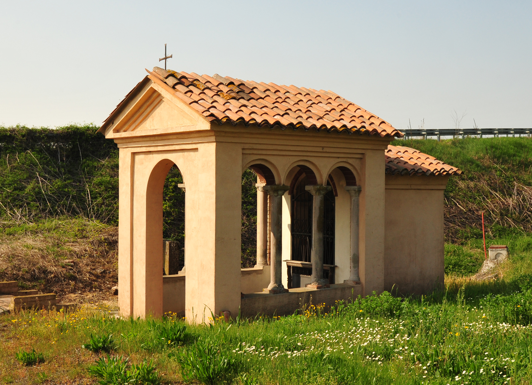 San Bernardino1